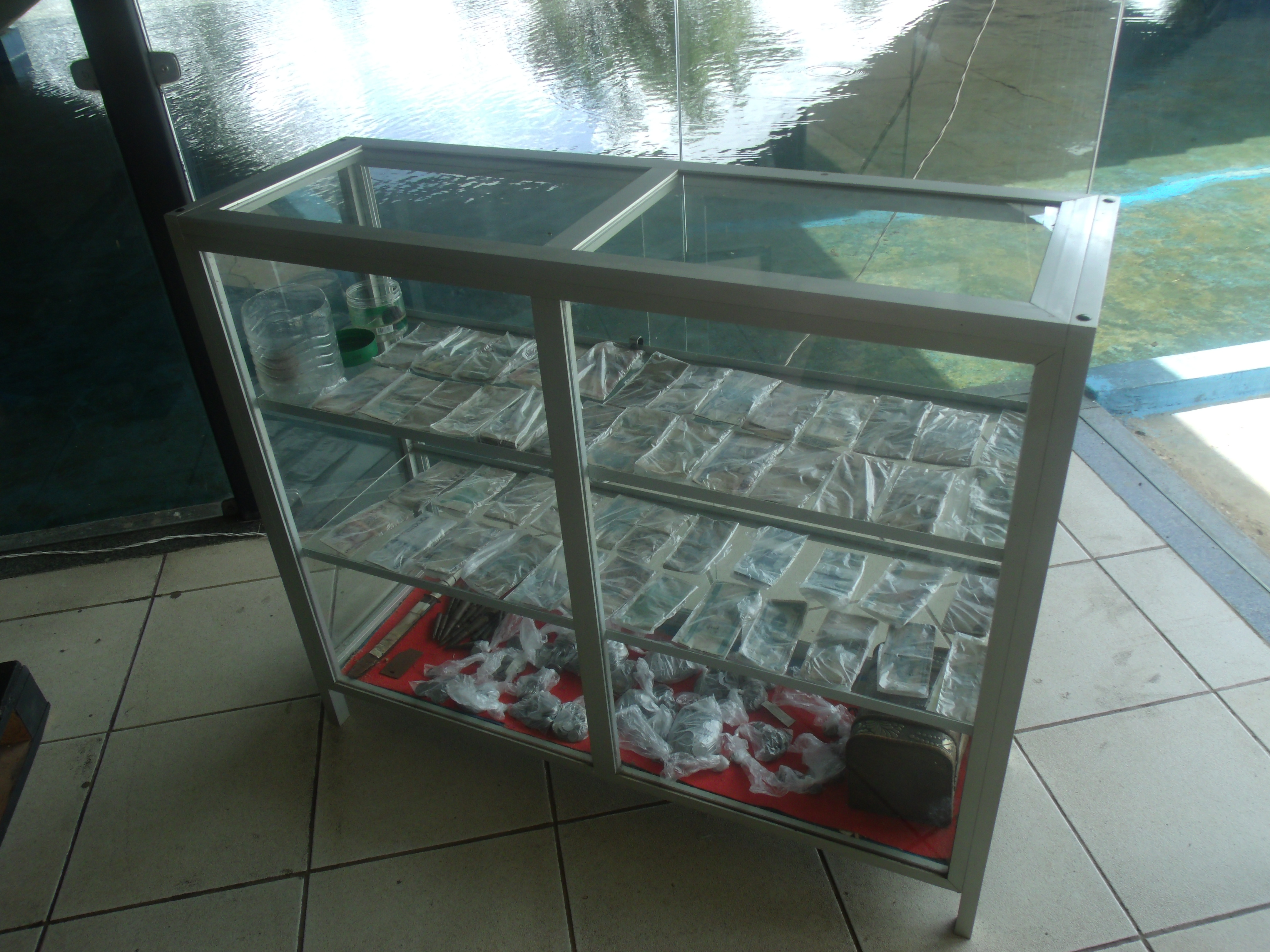 Estante de exposição de antigas cédulas de vários padrões monetários do Brasil no Museu do Monumento Nacional da Batalha do Jenipapo.